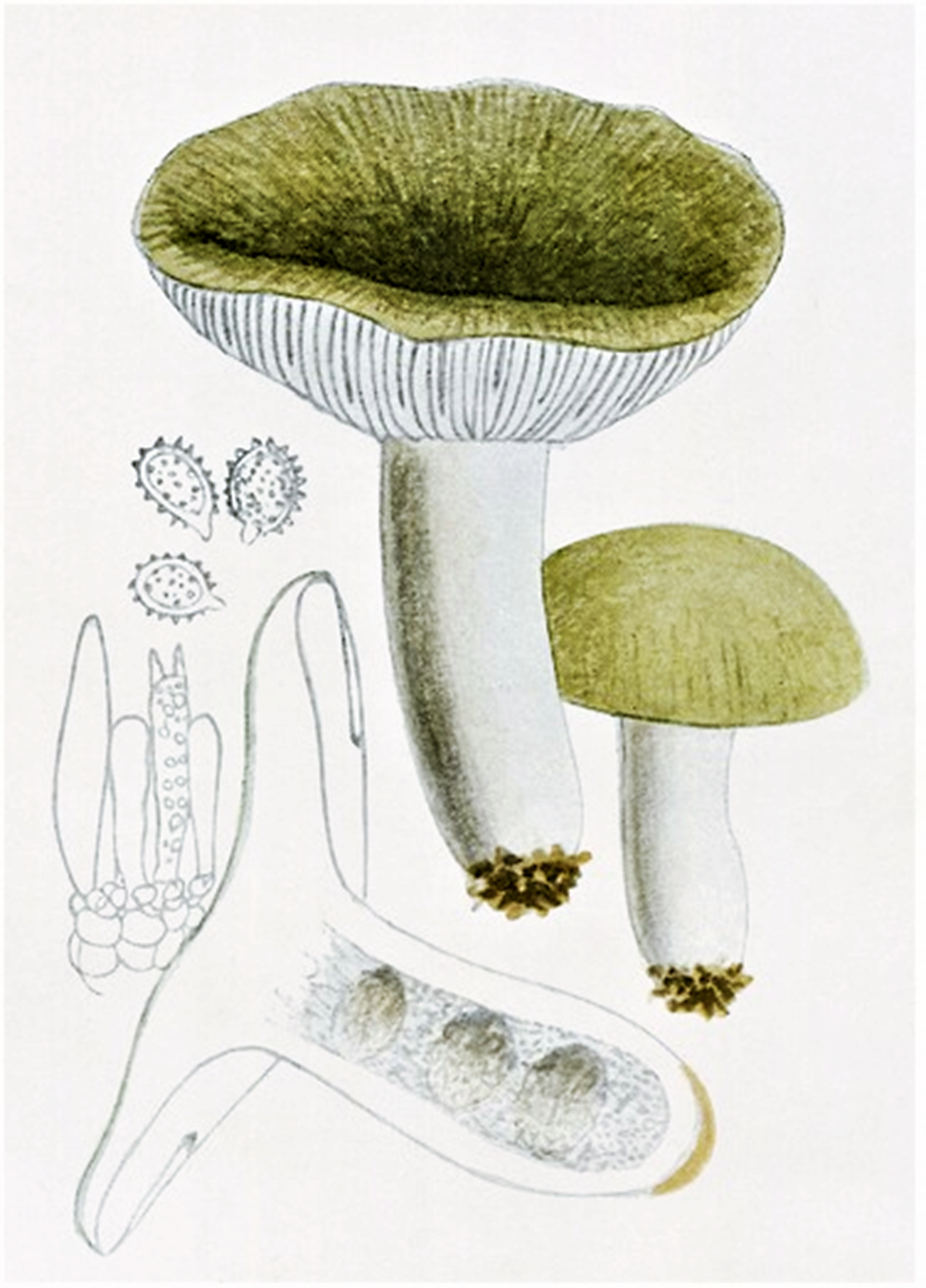 Giacomo Bresadola: Russula heterophylla (Fr., 1815) Fr. (1838)